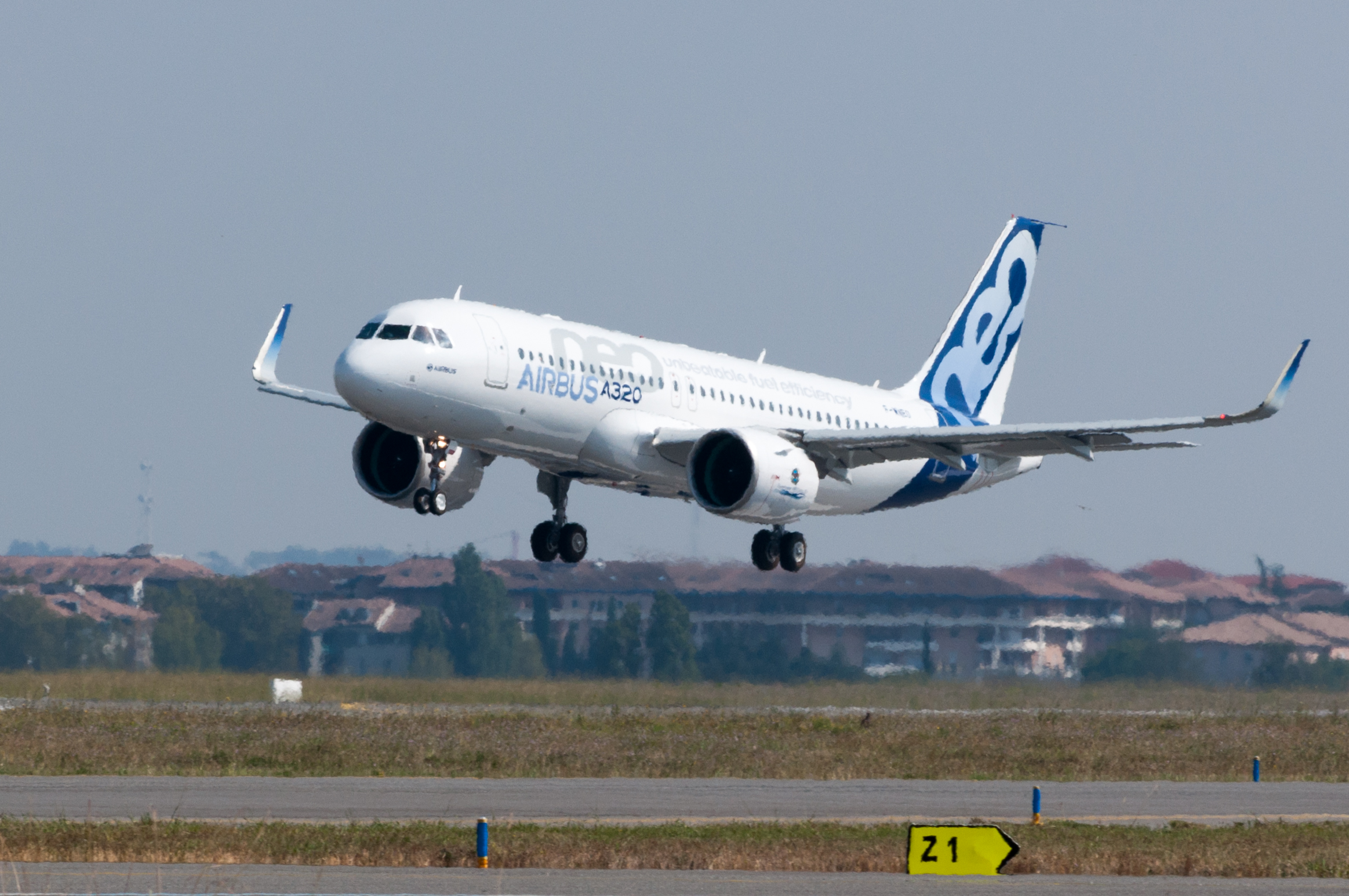 Atterrissage de l'A320neo après son premier vol